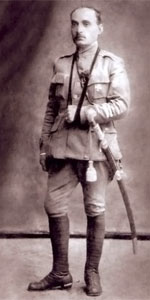 Каитбеков Расул-бек родился в 1880 году в селении Параул, Дагестанской области, по национальности кумык. Боевой офицер-полковник, начальник штаба Дагестанской армии с 1918 года, контрреволюционер. Расстрелян большевиками в 1921 году.